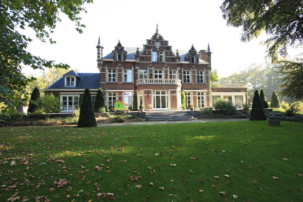 Bonheiden Befferdreef 15